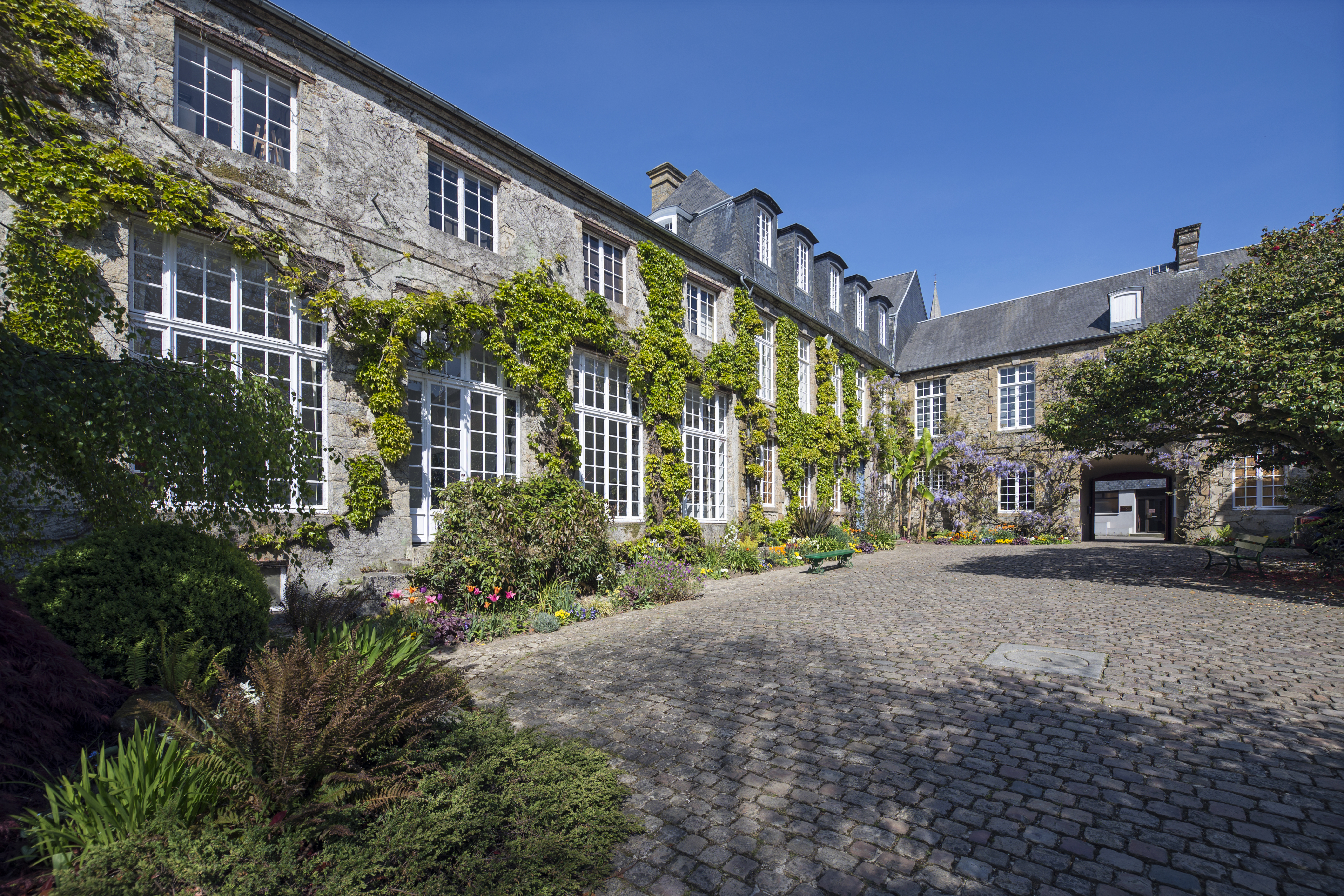 Musée Quesnel-Morinière à Coutances, Manche, avril 2017.